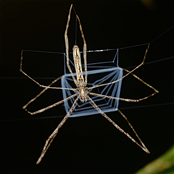 Deinopidae: Deinopis sp. Isla Colón, Bocas del Toro, Panama